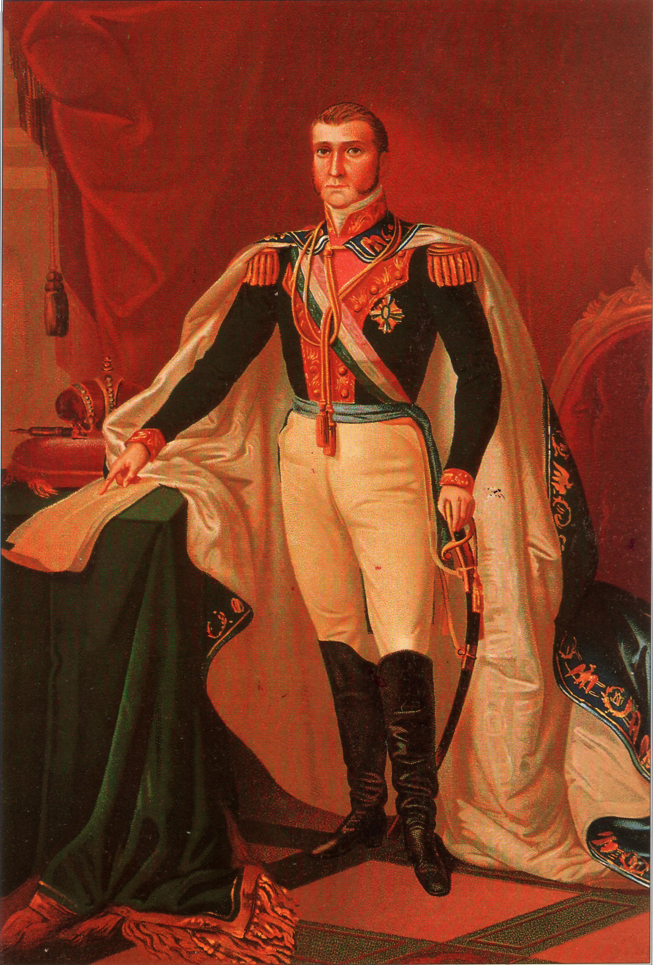 Agustín de Iturbide, primer emperador de México.